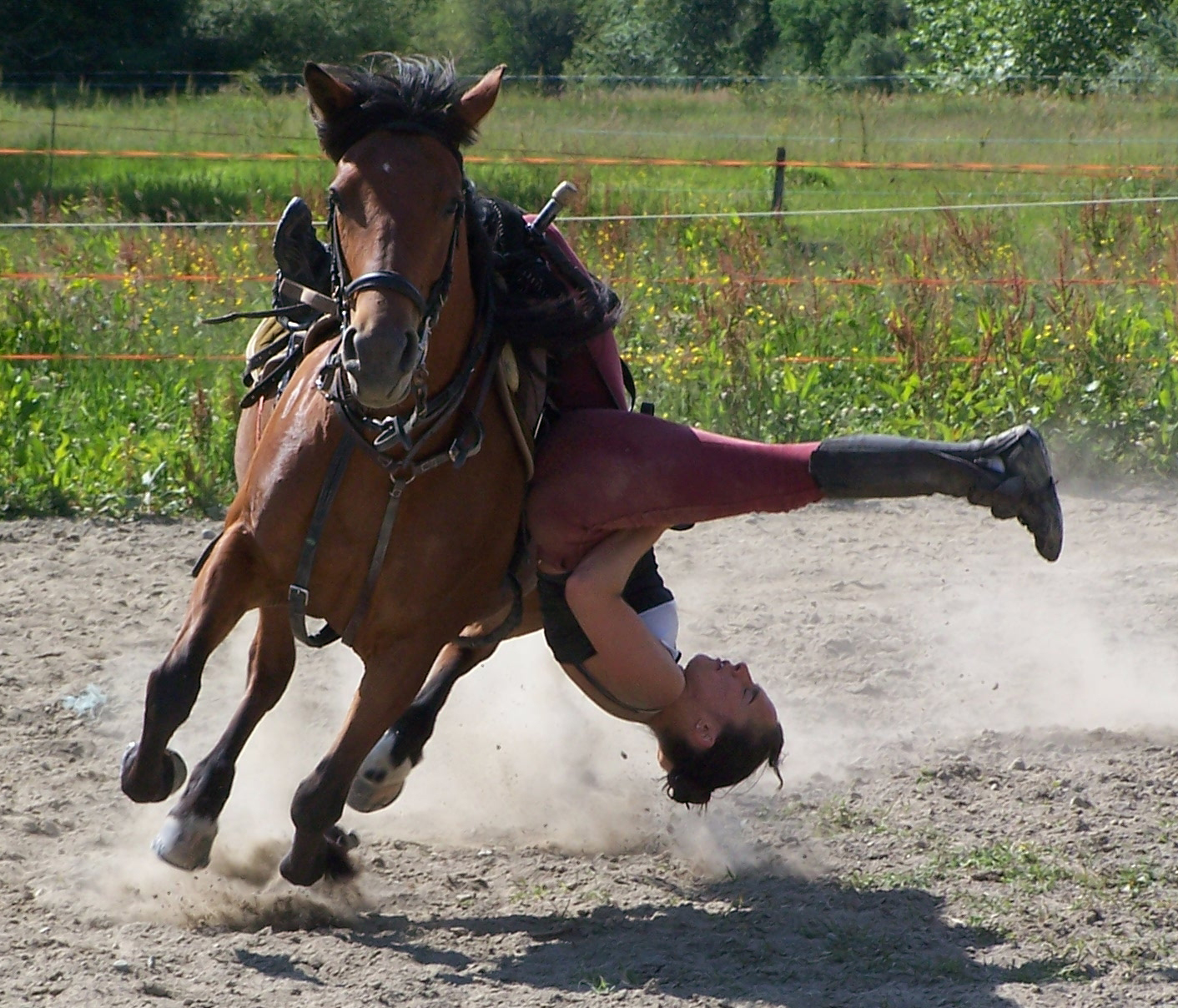 voltige cosaque, équitation, croix de la mort